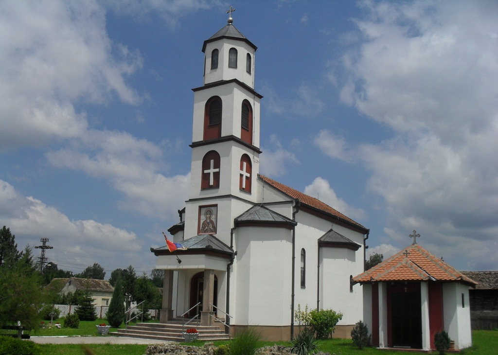 Храм СПЦ Св. великомученице Марине, Метковић, Мачва, Србија